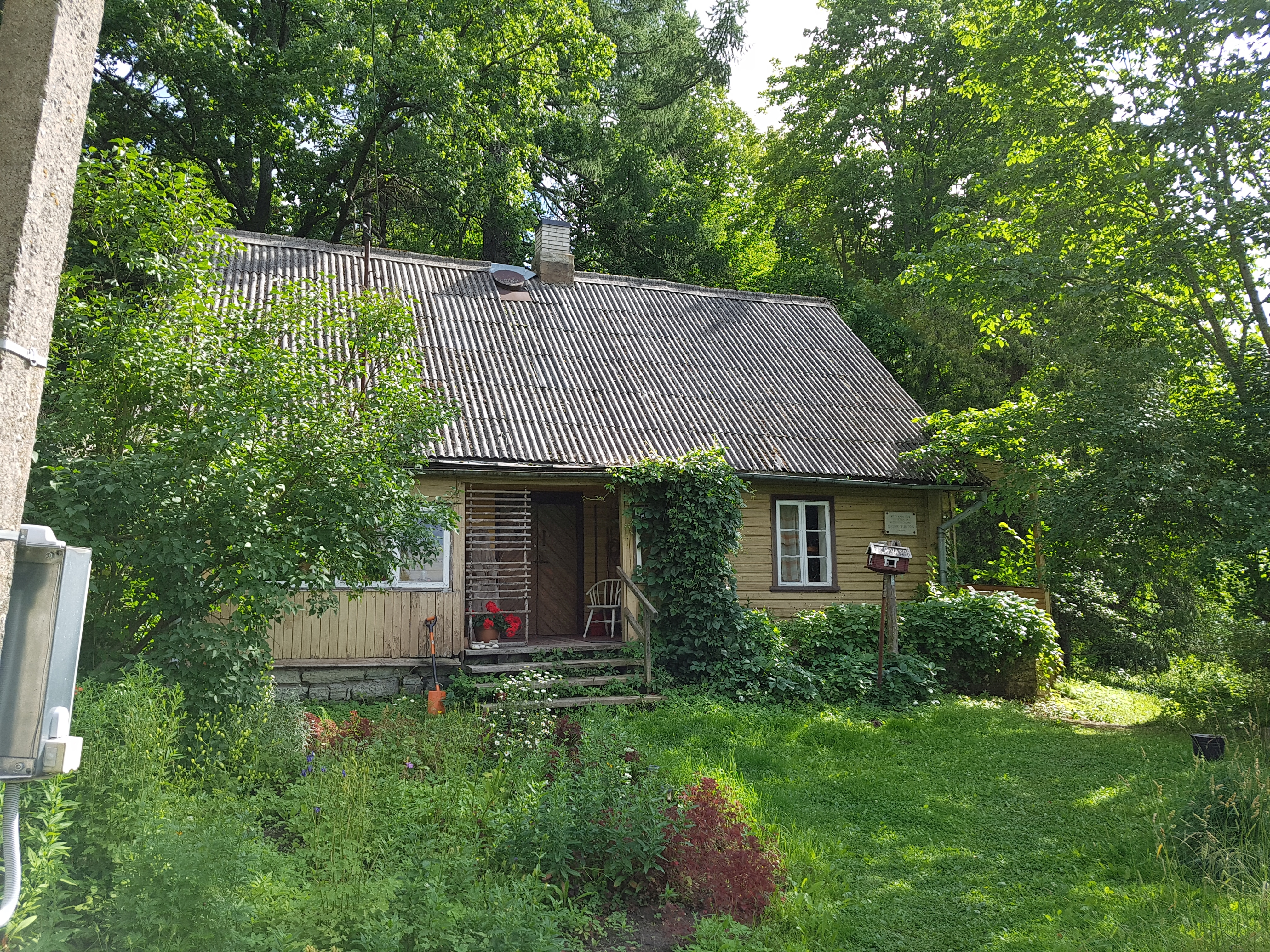 Gustav Wulff-Õie kodumuuseum Nüplis. Muuseum kuulub Eesti Kirjandusmuuseumile Tartus.